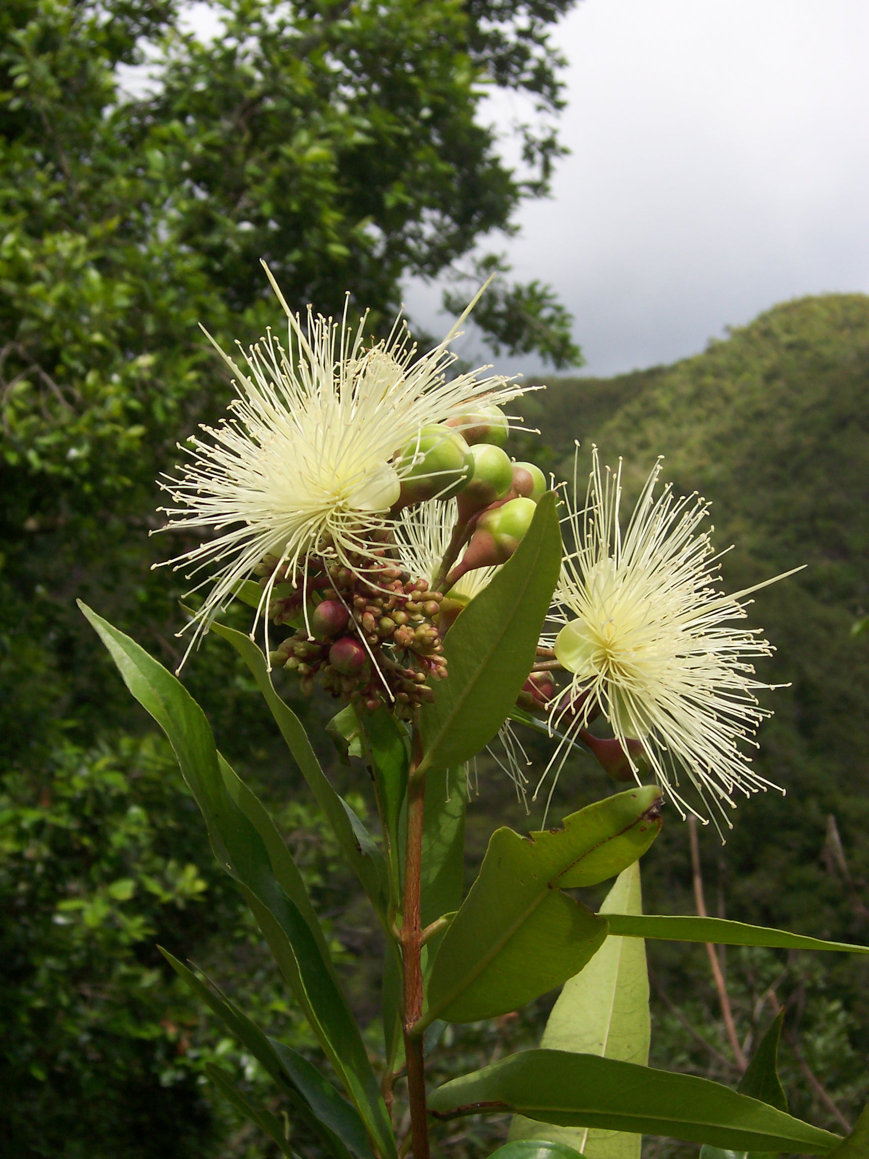 Syzygium jambos (flower)